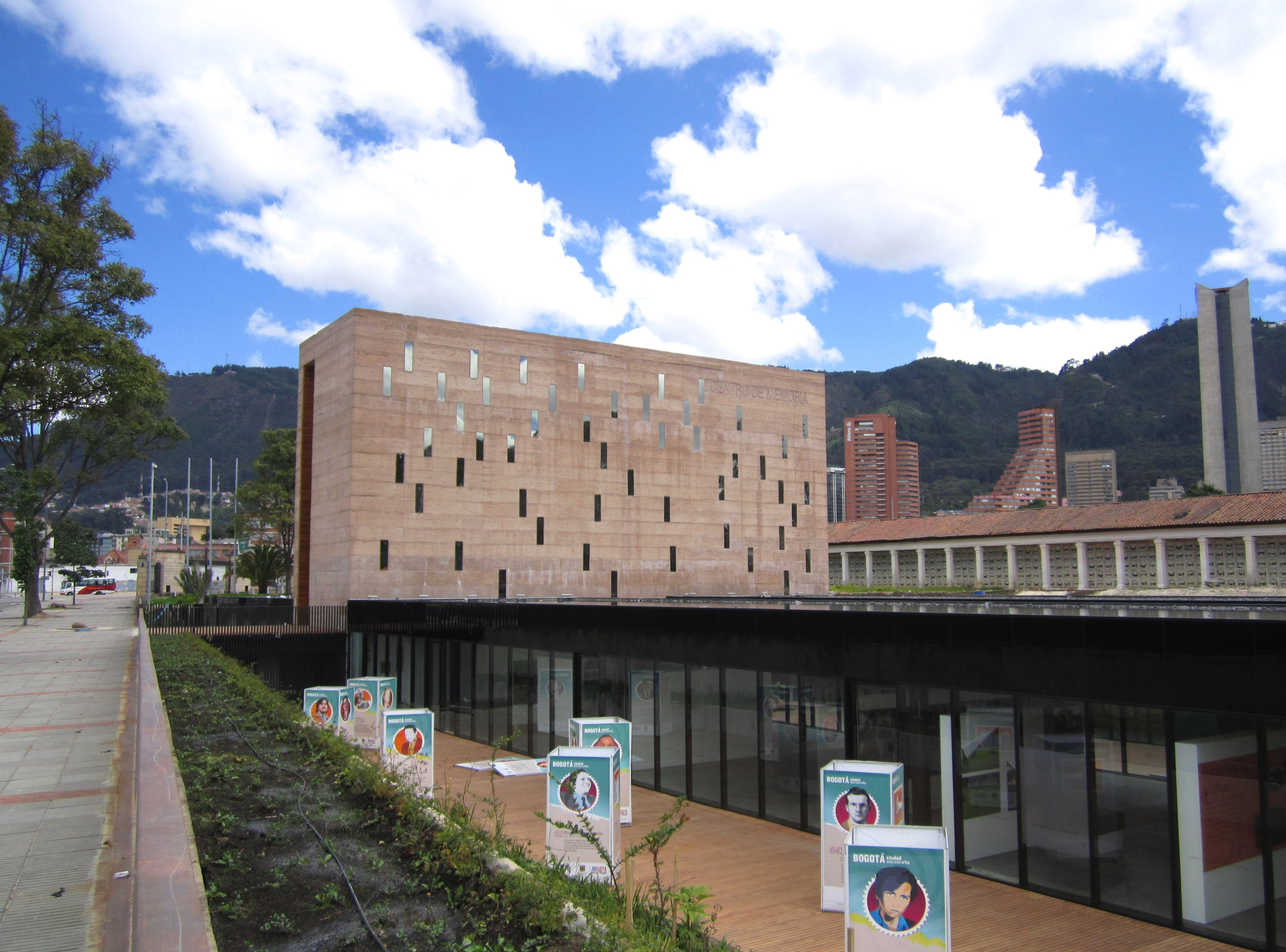 Bogotá - Centro Memoria Los Mártires.